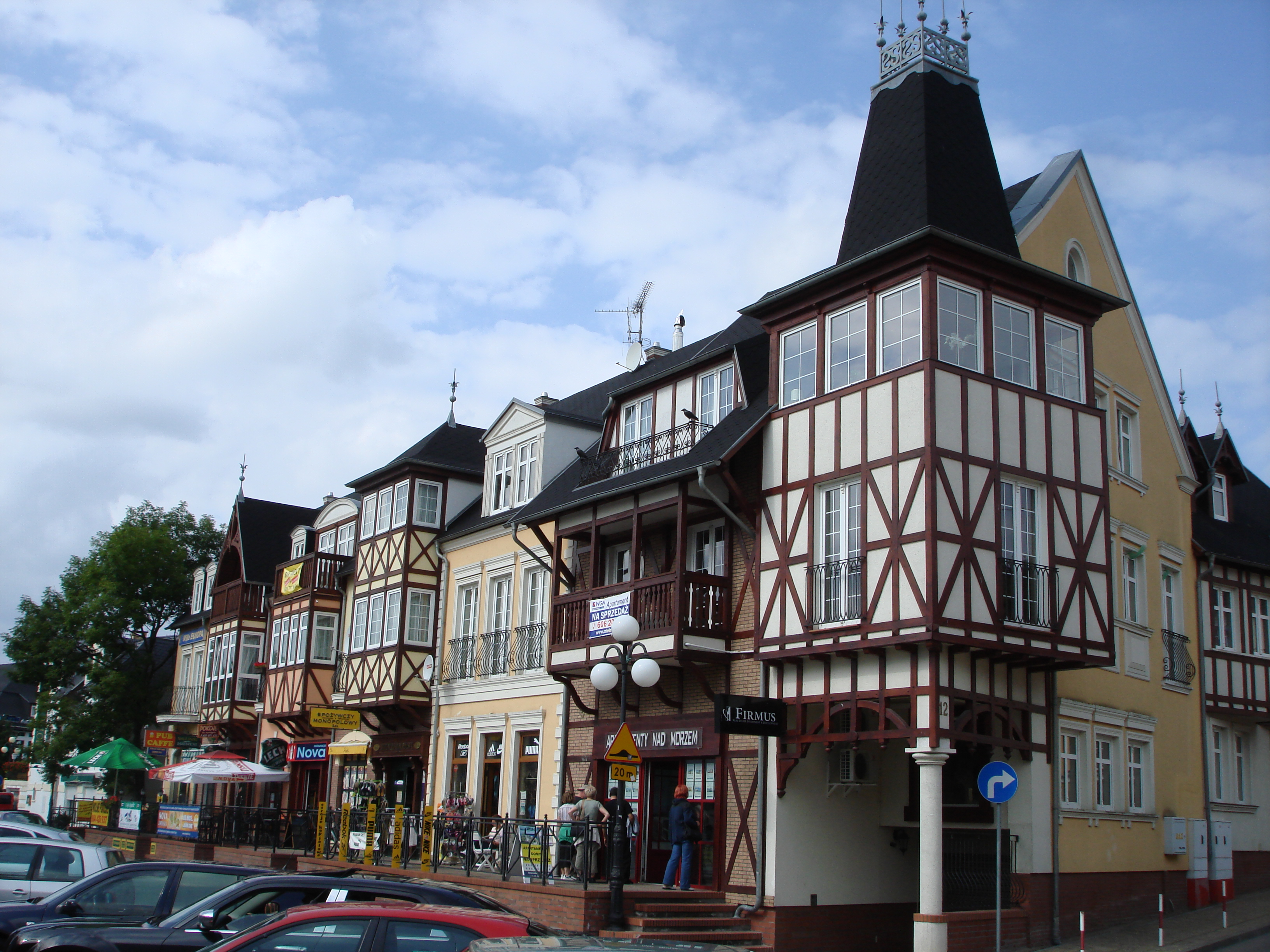 Mielno